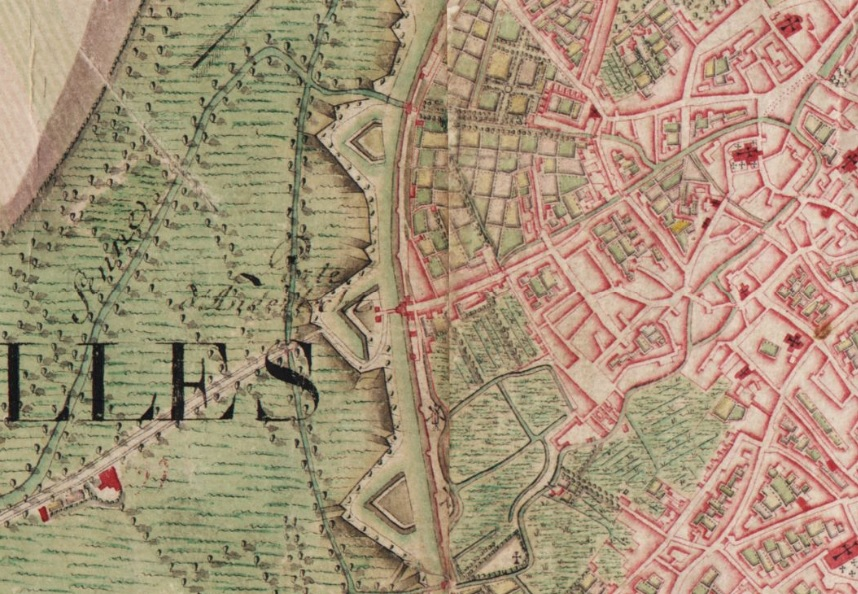 Extrait de la carte de Ferraris n° 76